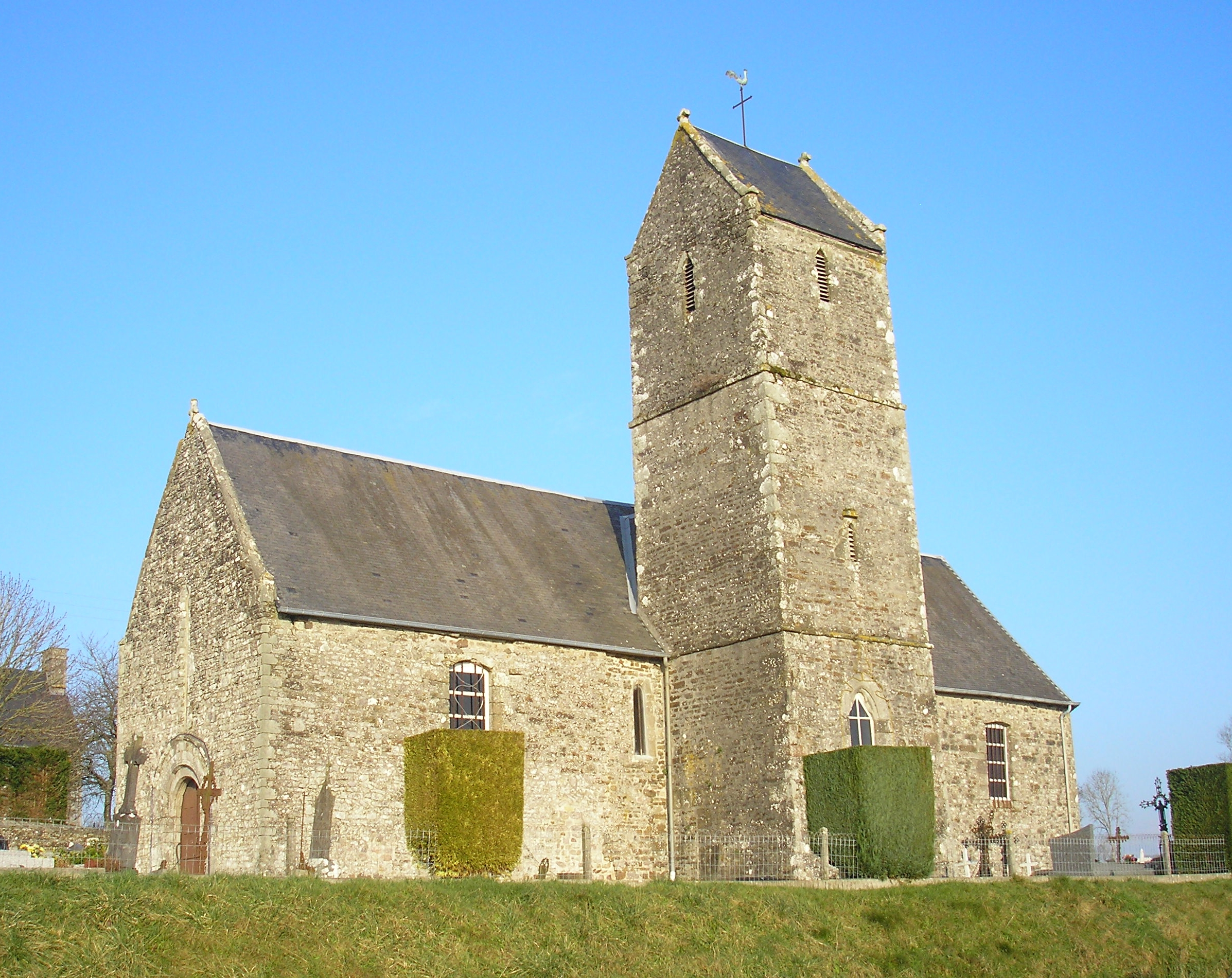 Montaigu-les-Bois (Normandie, France). L'église de L'Orbehaye.